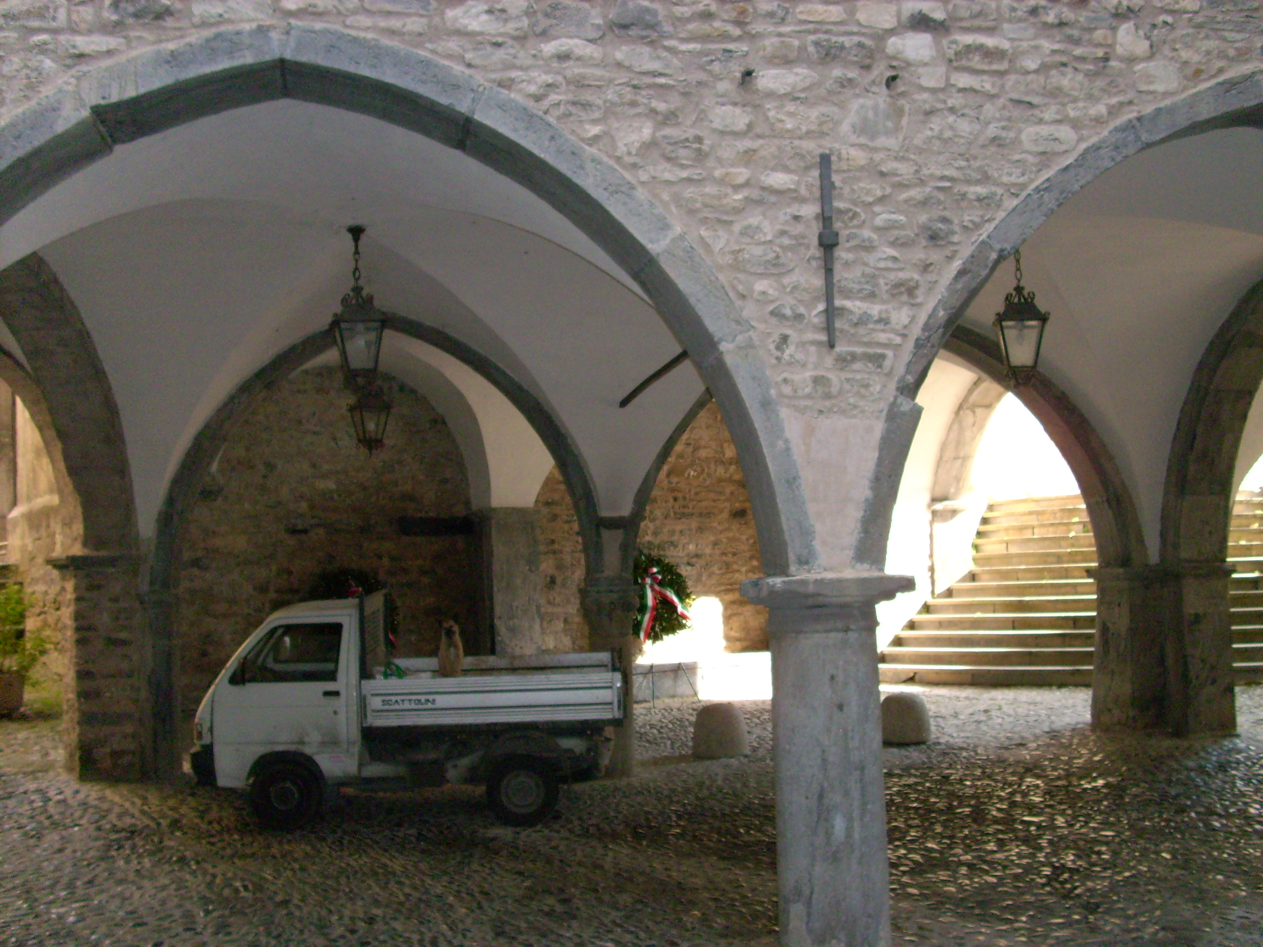 Pigna (IM), Liguria, Italia